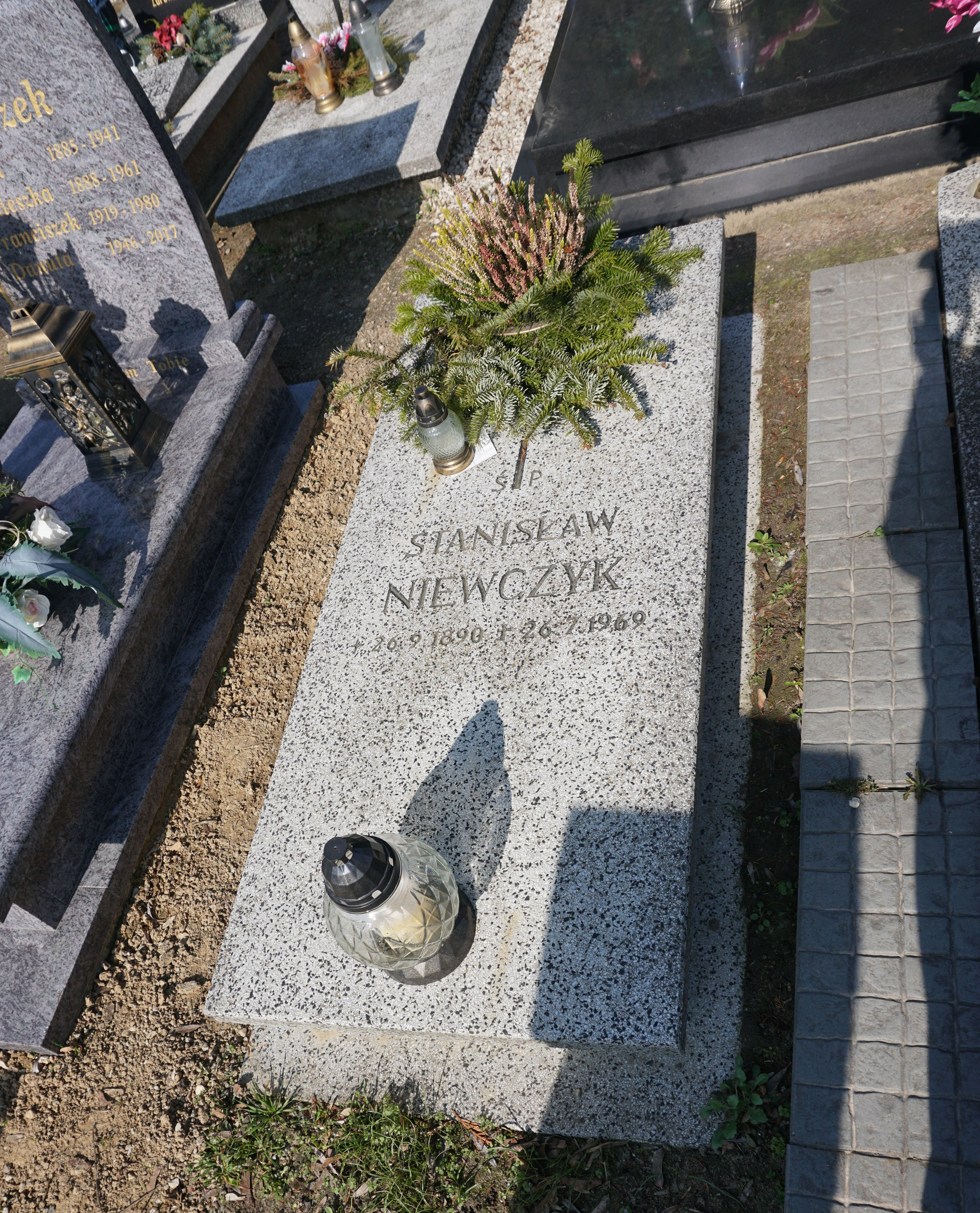 Grób Stanisława Niewczyka na Cmentarzu Górczyńskim